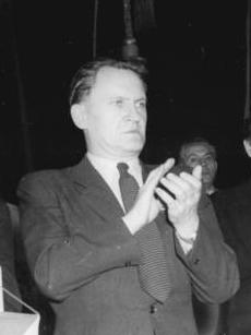 ADN-ZB-Heilig Hlg.-Schm 1.4.1954 IV. Parteitag der Sozialistischen Einheitspartei Deutschlands, Berlin, Werner-Seelenbinderhalle UBz.: Gäste der Bruderparteien im Präsidium. Von links nach rechts: Genosse Waldeck Rochet, Mitglied des Politbüros der Kommunistischen Partei Frankreichs, Genosse Julius Duris, Mitglied des Präsidiums des Zentralkomitees der Kommunistischen Partei der Tschechoslowakei und Minister der Finanzen. Gen. Franciszek Jozwiack-Witold, Mitglied des Politbüros und Vorsitzender der Zentralen Partei-Kontrollkommission der Vereingten Polnischen Arbeiterpartei und Minister für Staatskontrolle. Stammabzug darf nicht aus dem Hause